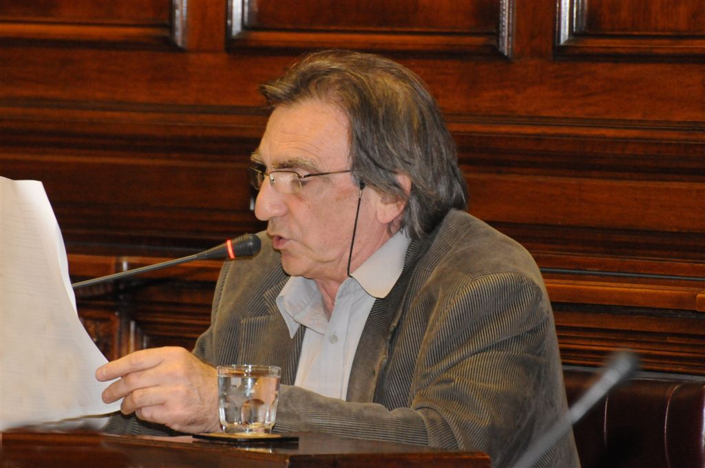 Representante Julio Battistoni en la Cámara de Diputados